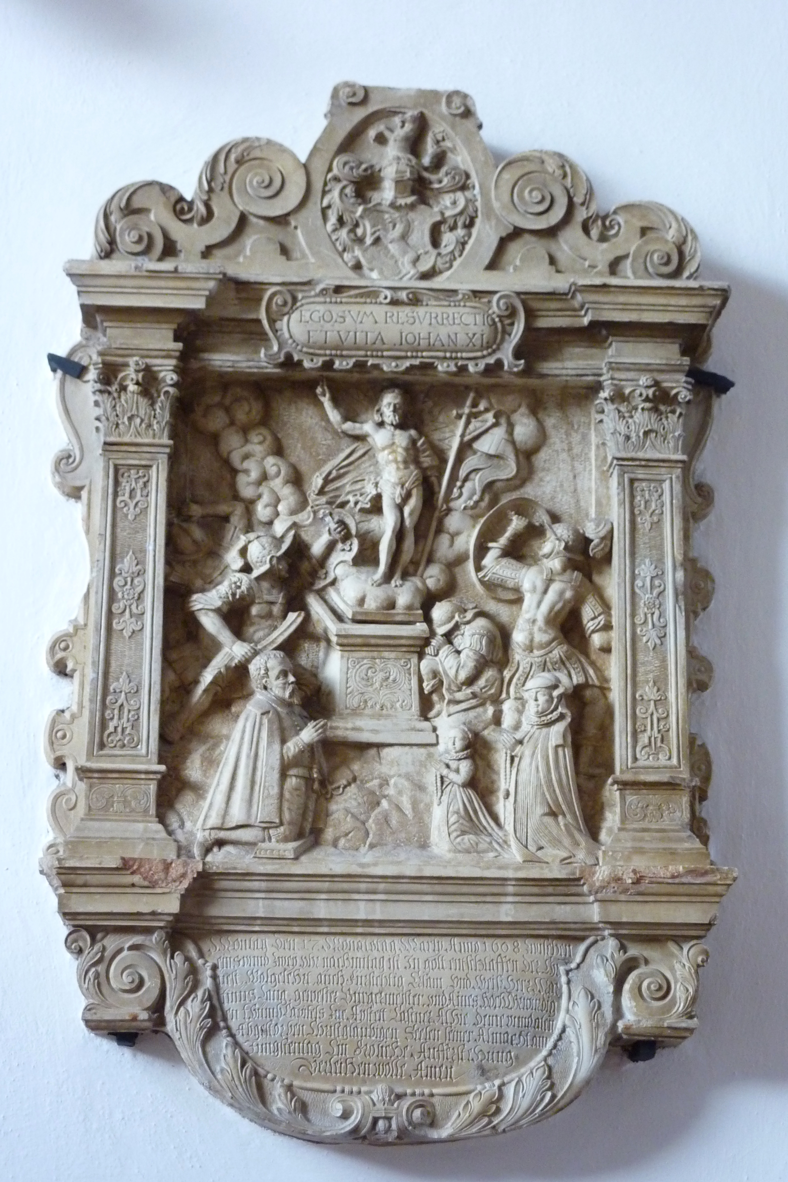 katholische Pfarrkirche St. Emmeram in Wemding